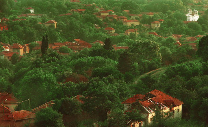 Село Беглеж